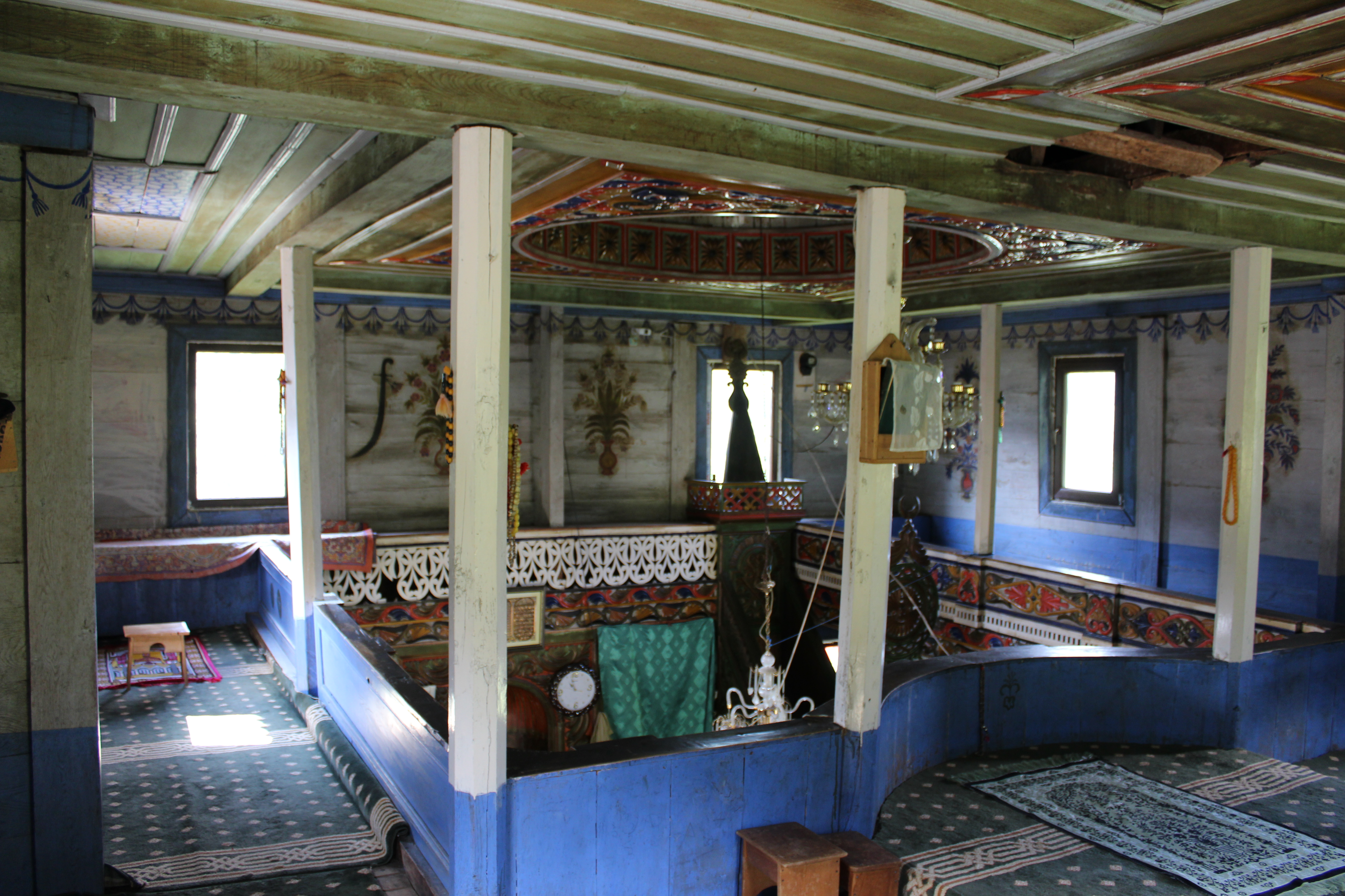 ზოტის მეჩეთი, ინტერიერი